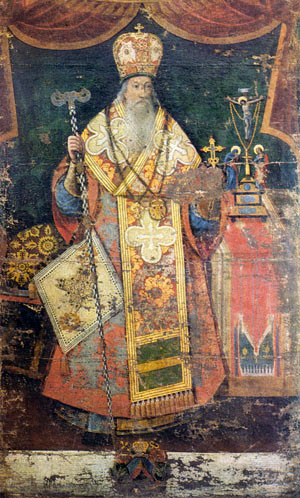 Митрополит Иоасаф Кроковский